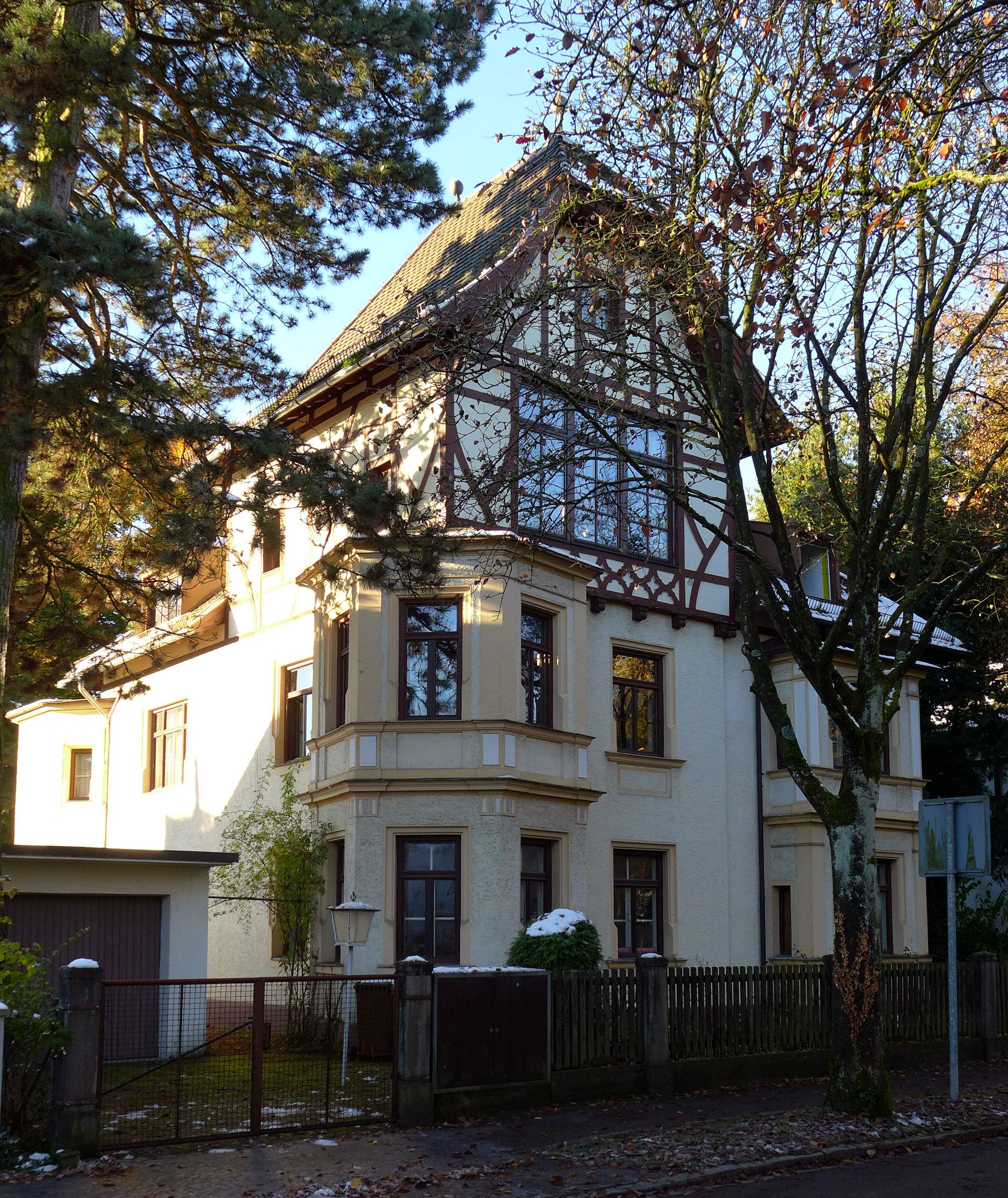 Rubensstr 1, München